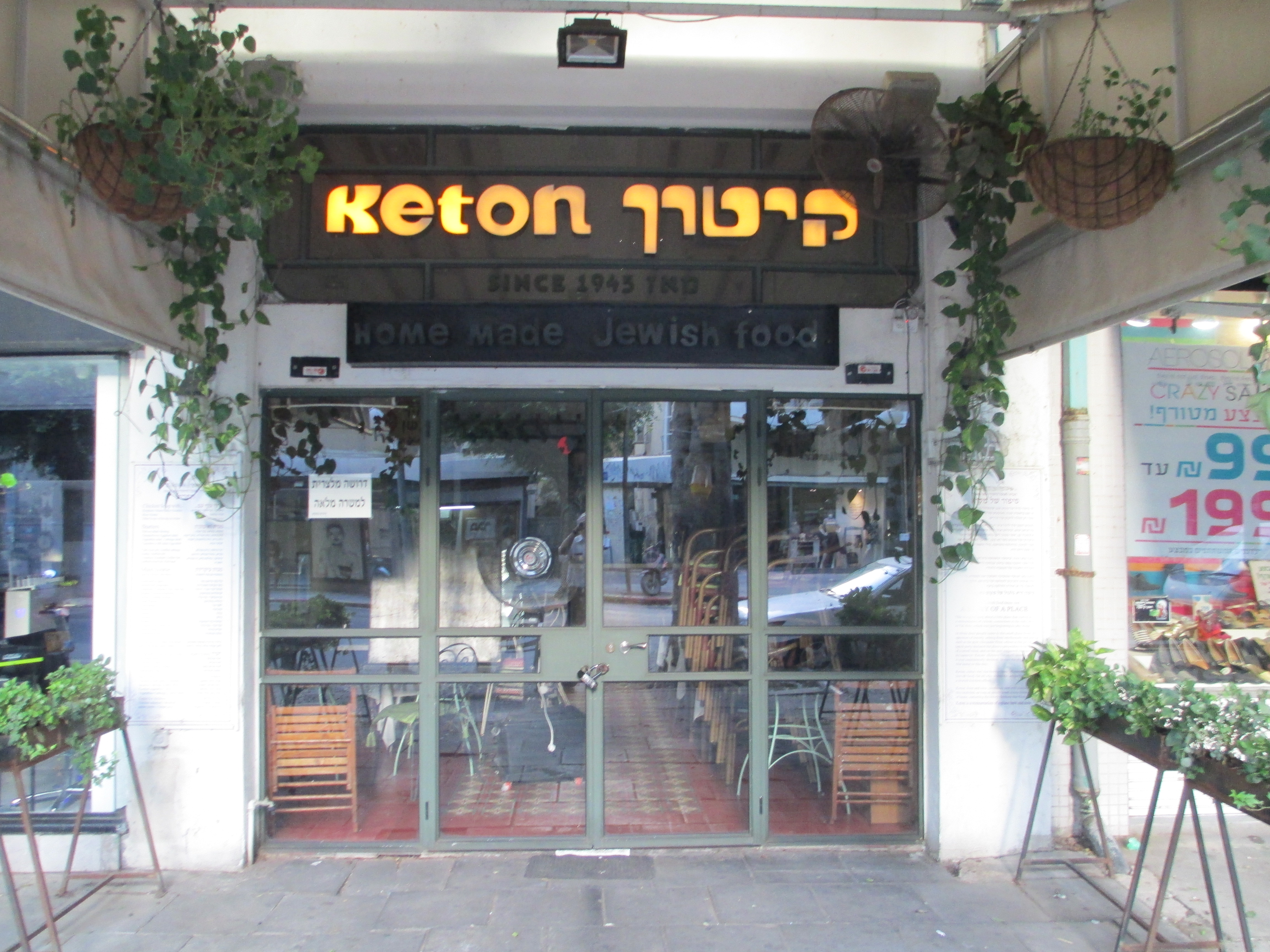 מסעדת קיטון ברחוב דיזנגוף בתל אביב